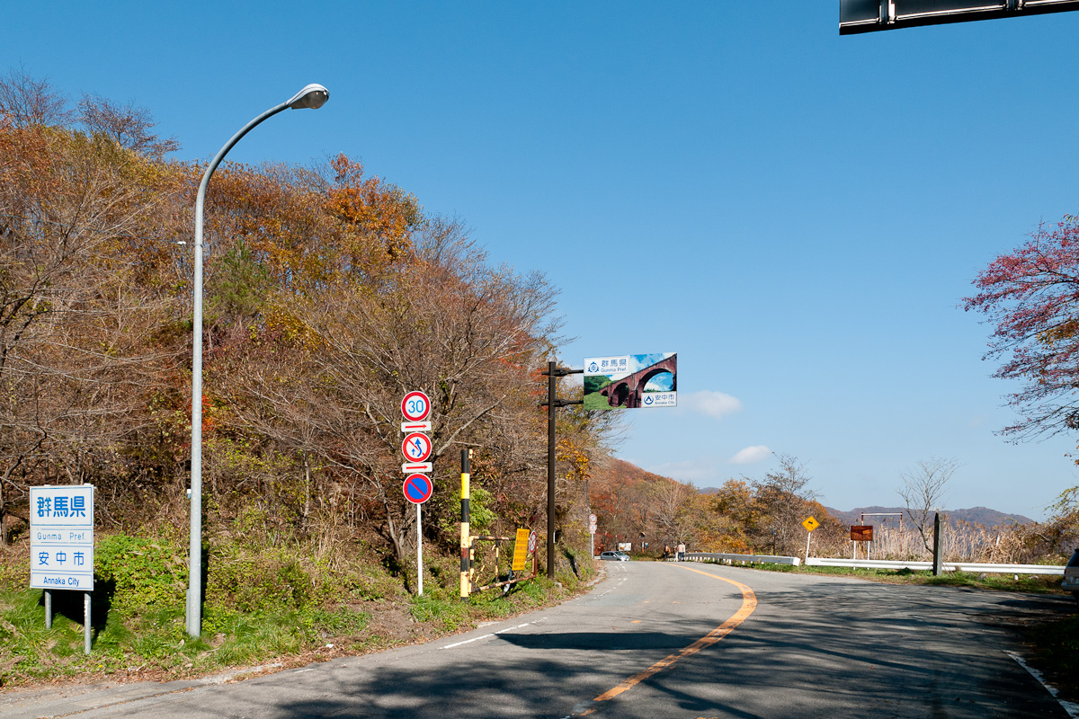 国道18号（中山道）碓氷峠、群馬県安中市と長野県北佐久郡軽井沢町の県境。